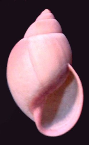 Megalobulimus oblongus, syn. Strophocheilus oblongus